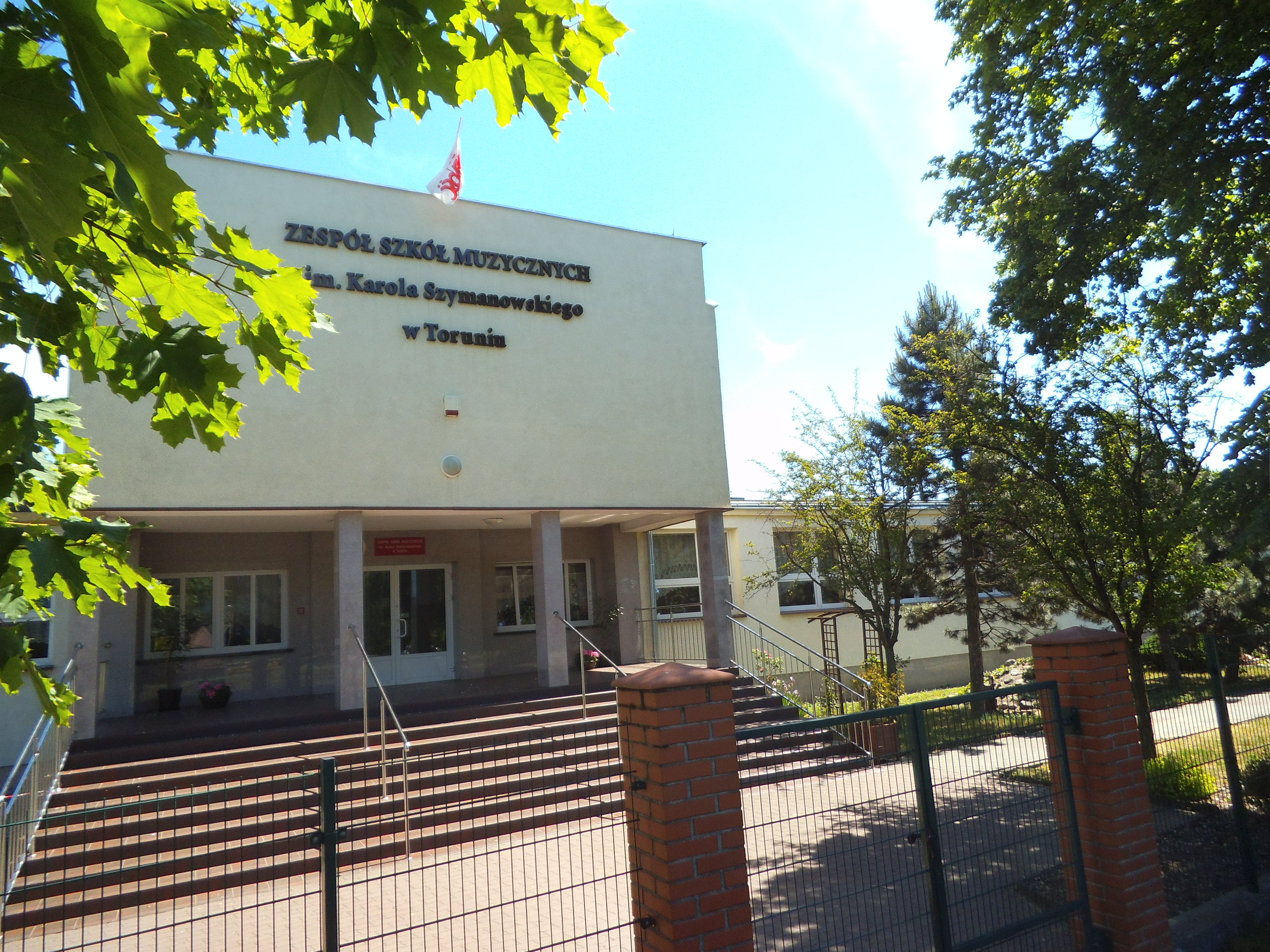 Zespół Szkół Muzycznych im. Karola Szymanowskiego w Toruniu